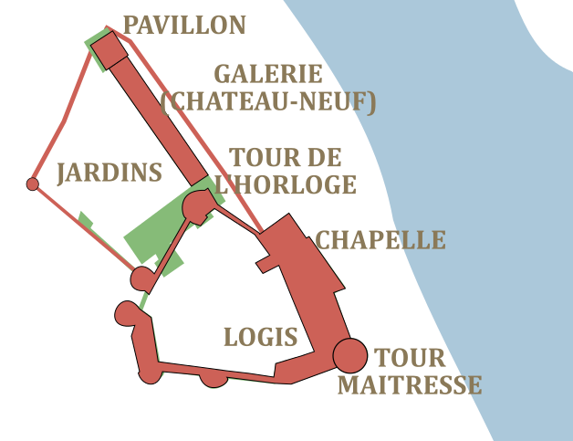 Plan schématique du château de Laval au XVIème siècle, superposé au château actuel.